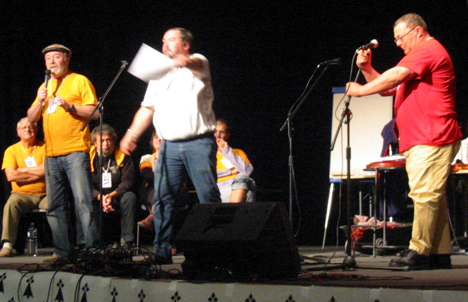 Joute contée à la Fête Mill Góll en Pays Gallo 2007